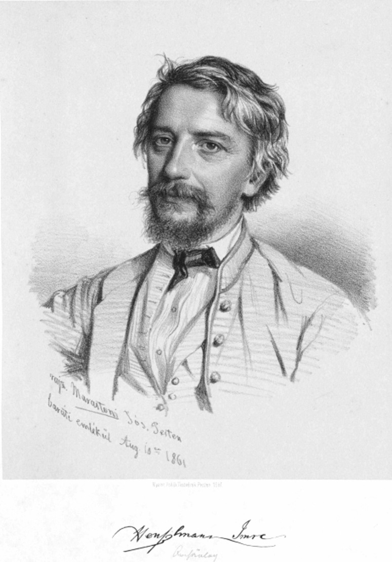 Imrich Henszlmann